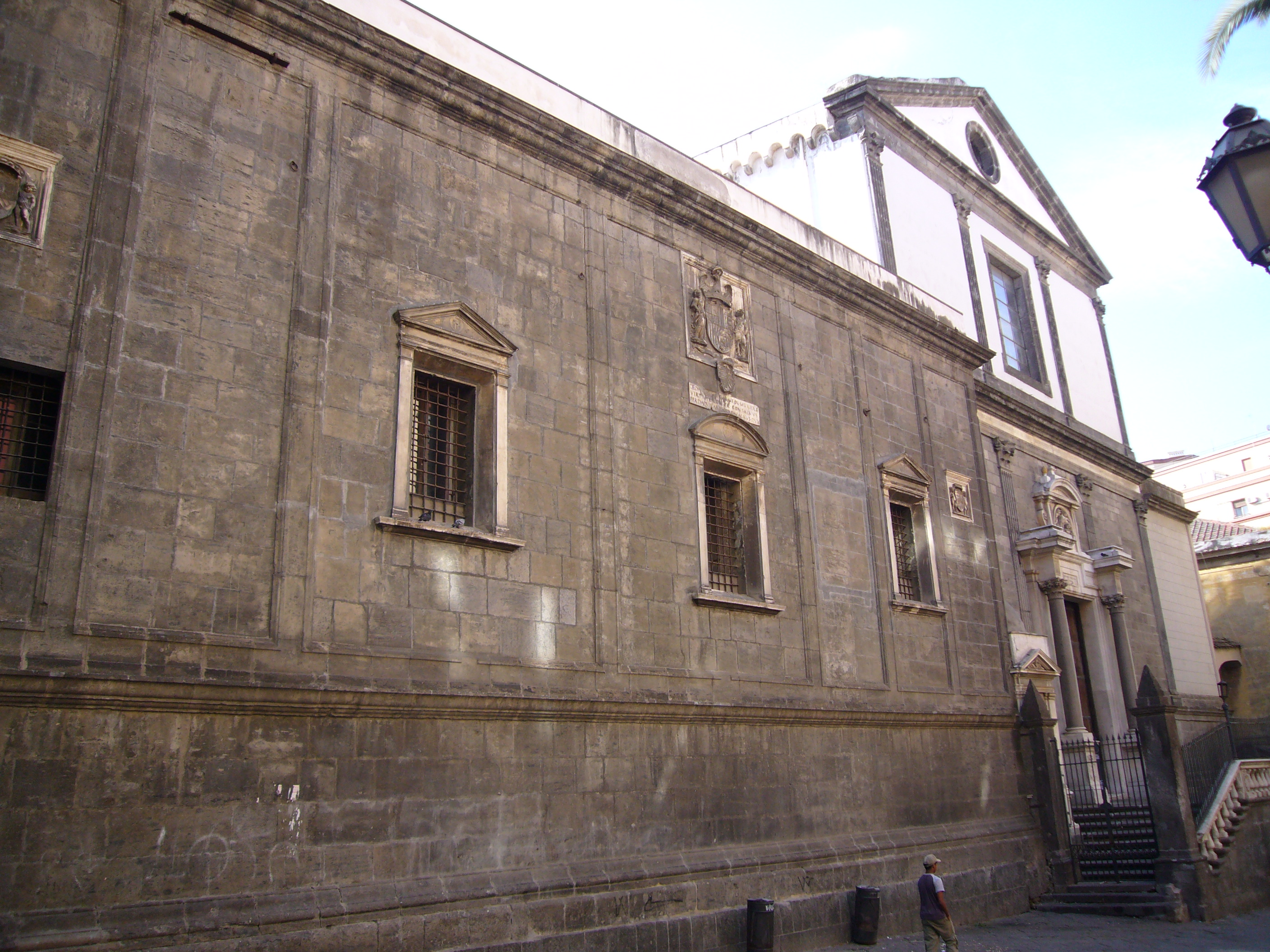 Napoli, Santa Maria la Nova: convento